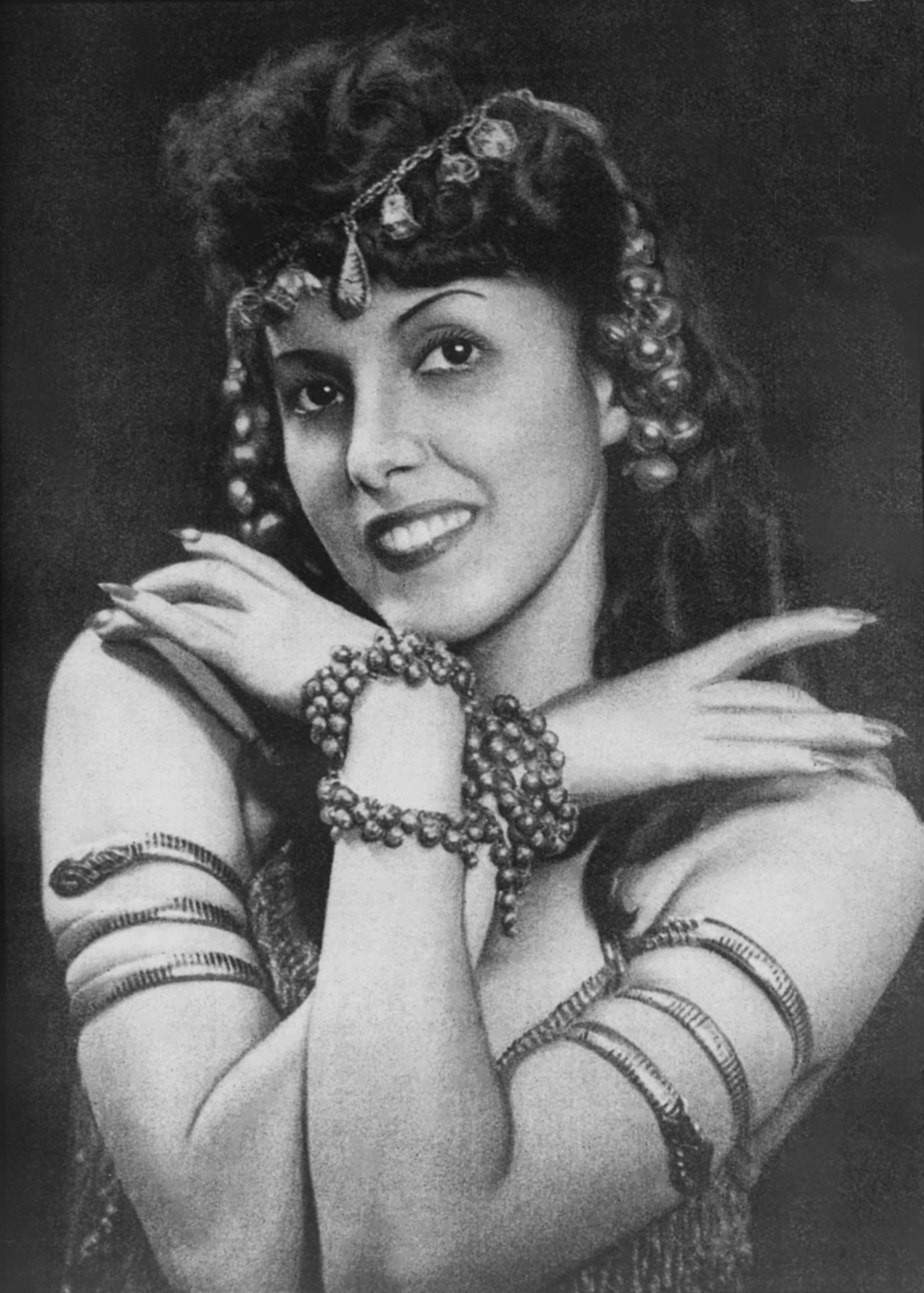 A bailarina brasileira Eros Volúsia em 1943.